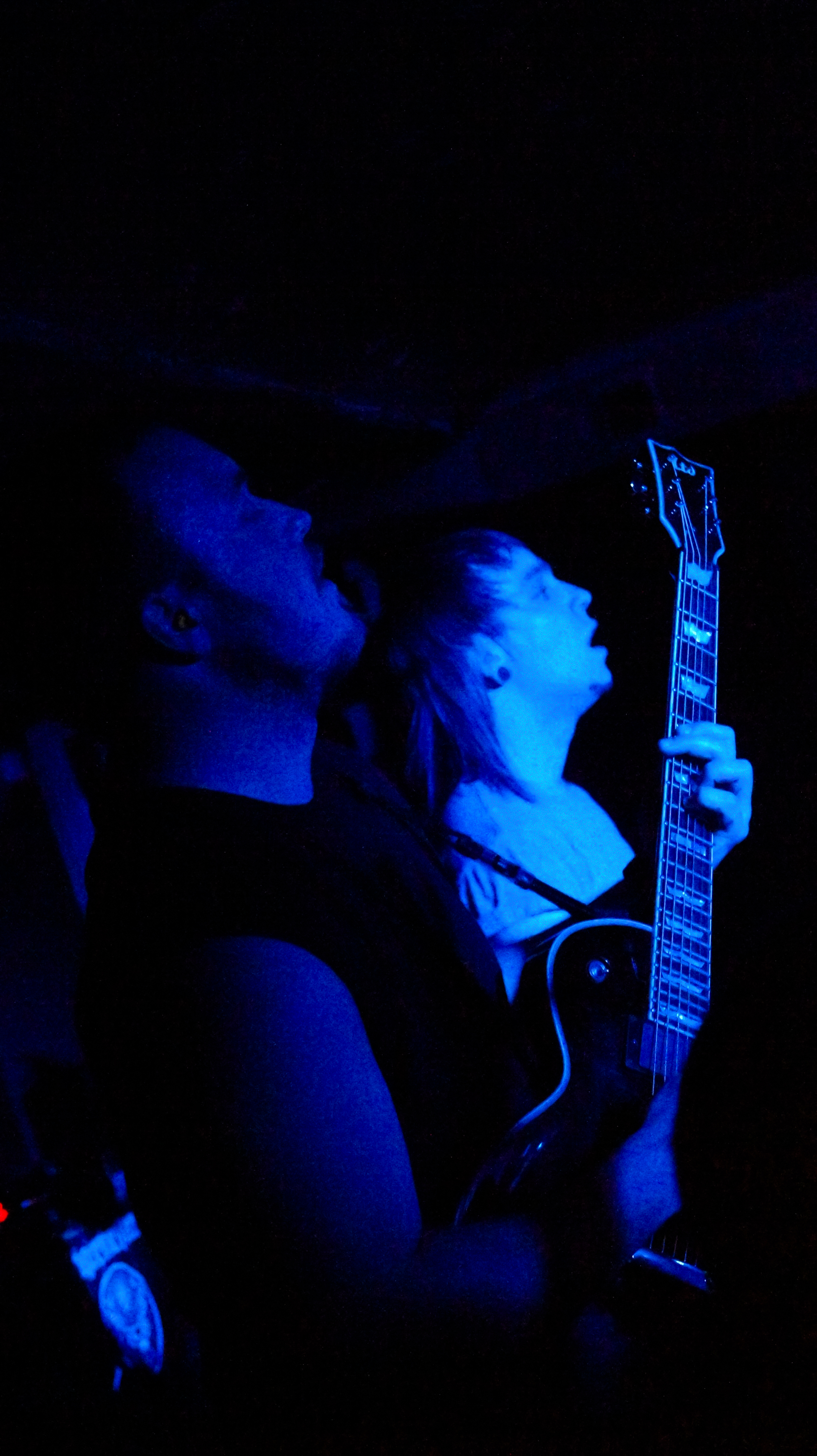 Выступление группы Devil Sold His Soul в России, в городе Самара 7 октября 2011 года